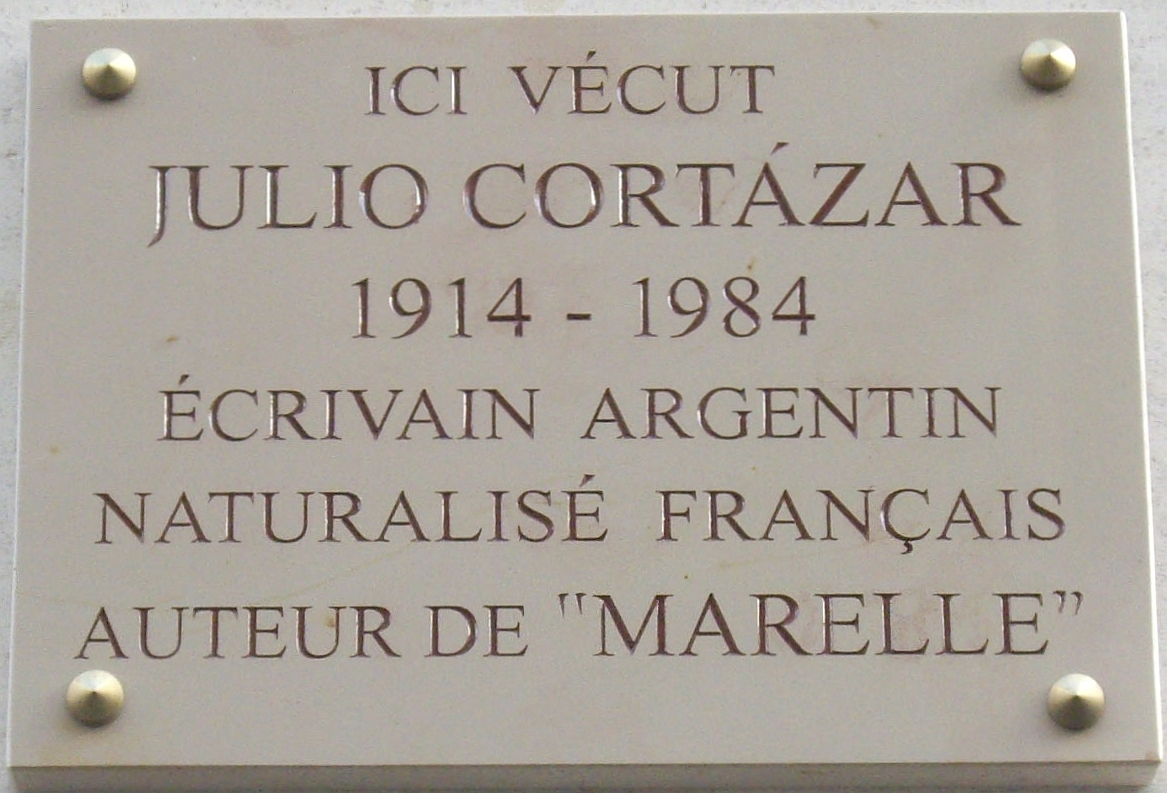 Plaque commémorative, 4 rue Martel, Paris 10e. « Ici vécut Julio Cortázar, 1914-1984, écrivain argentin naturalisé français, auteur de Marelle. »